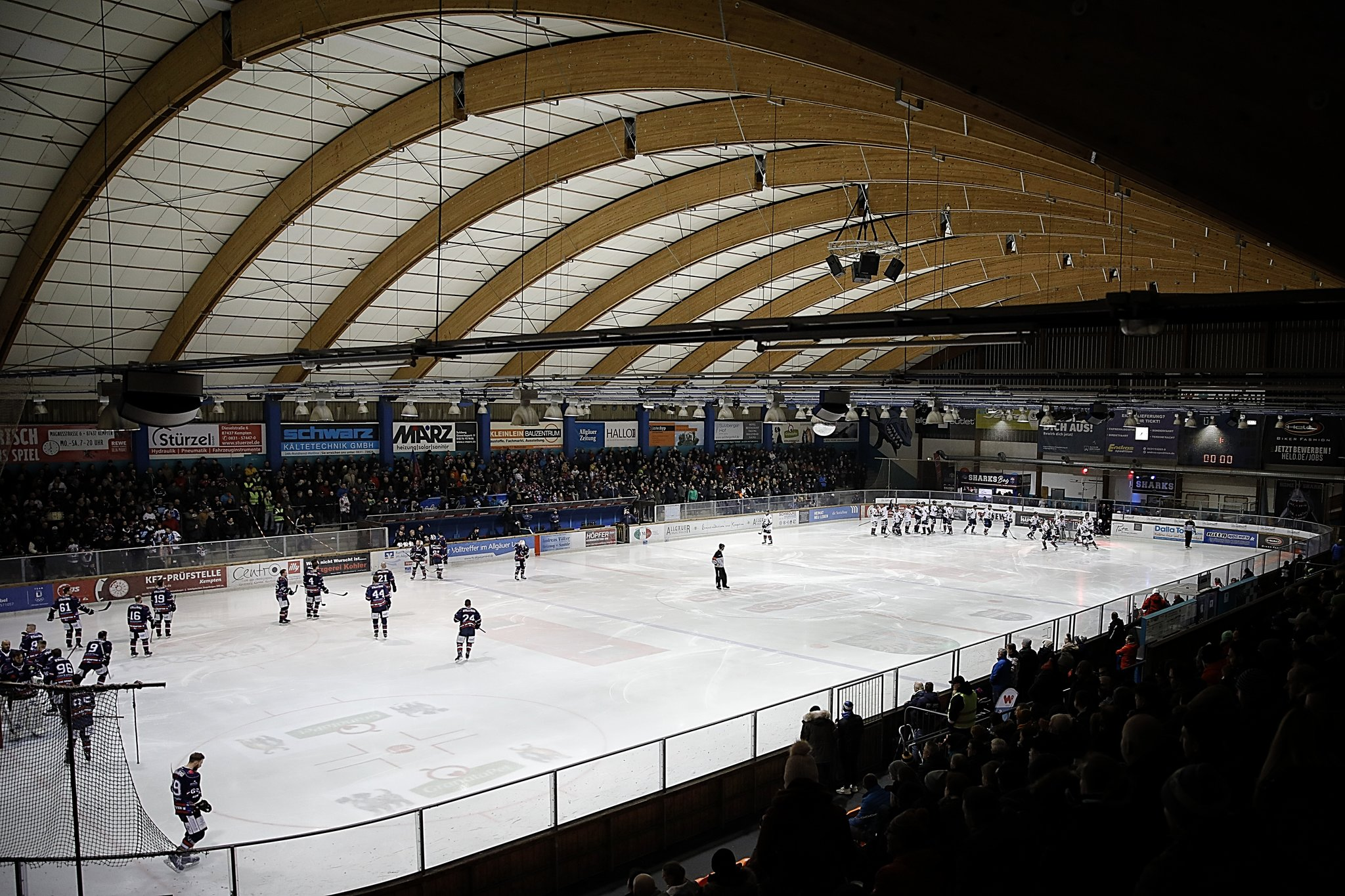 Eisstadion ESC Kempten Sharks Eishockeyverein Kempten